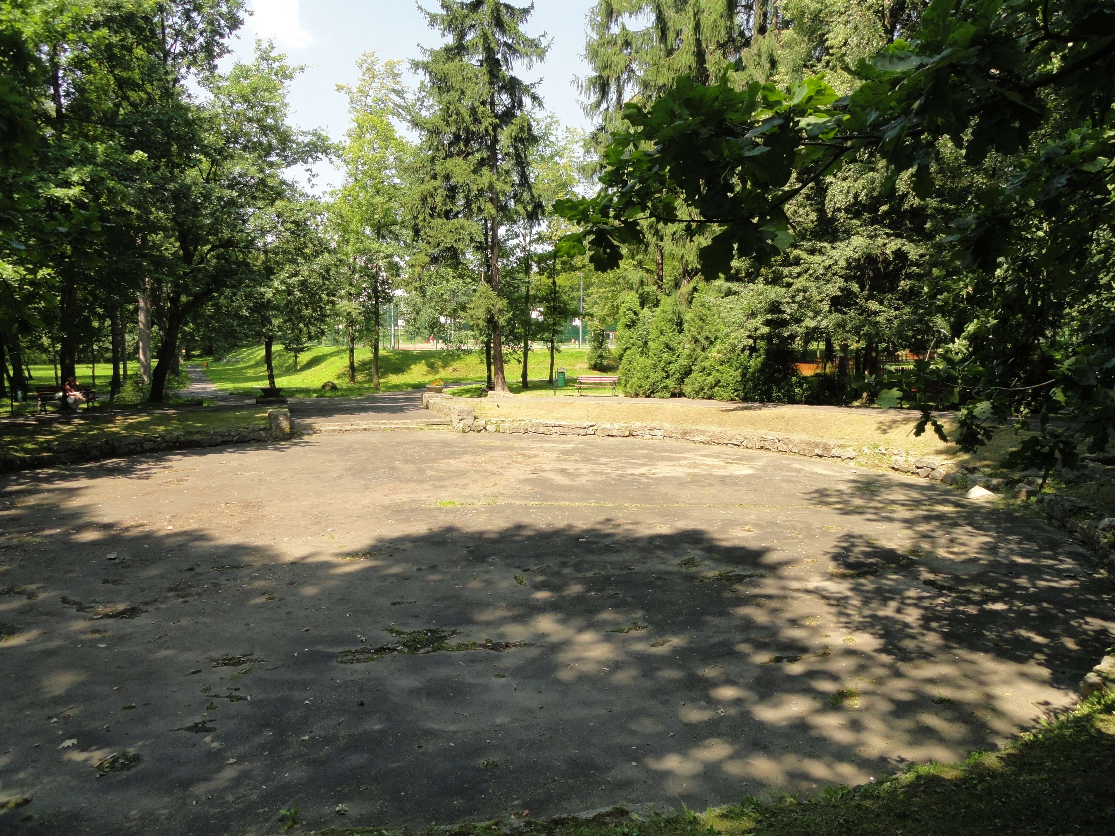 Ehemaliges Planschbecken im Park Andrzeja Błachańca (einst Georg-Snay-Park) in Zgorzelec